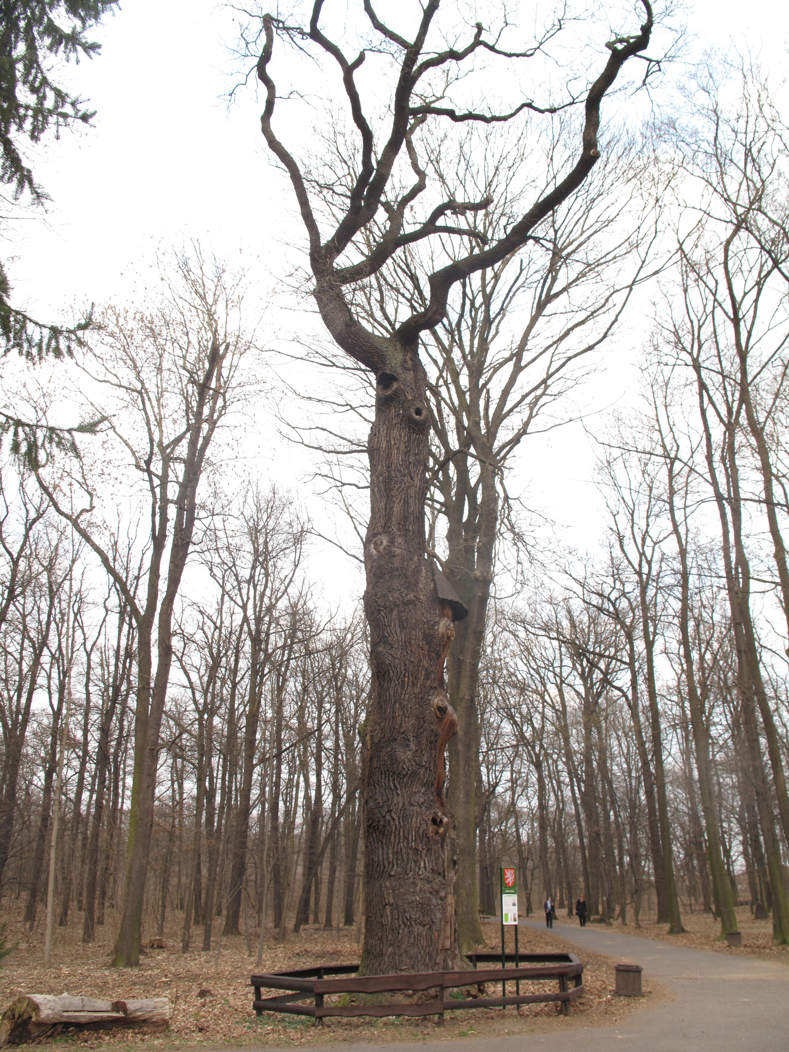 Památný dub letní u hájovny v Čimickém háji